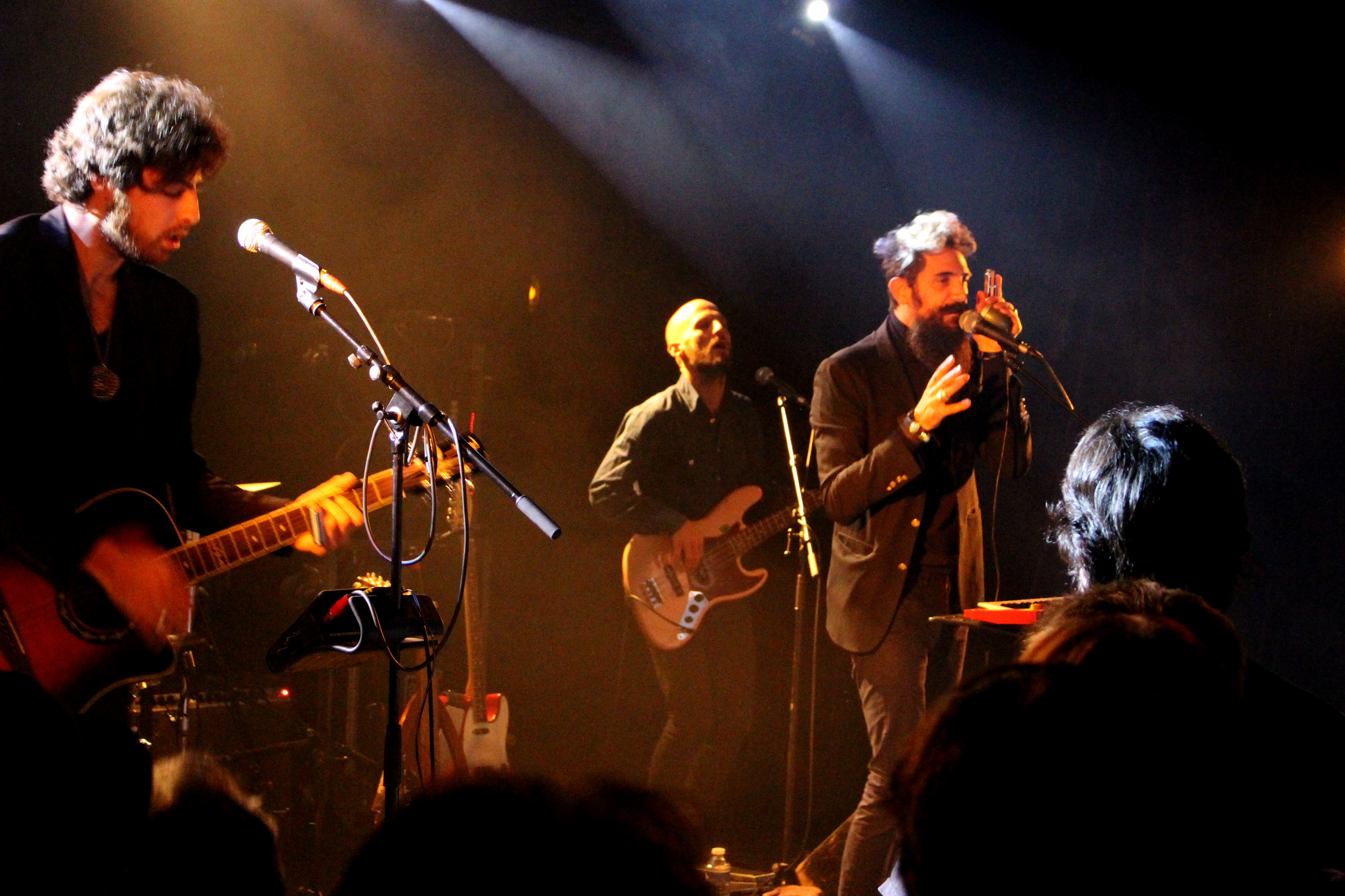 The Wanton Bishops, concert Les Rendez-Vous Soniques, Saint-Lô, 14 novembre 2015